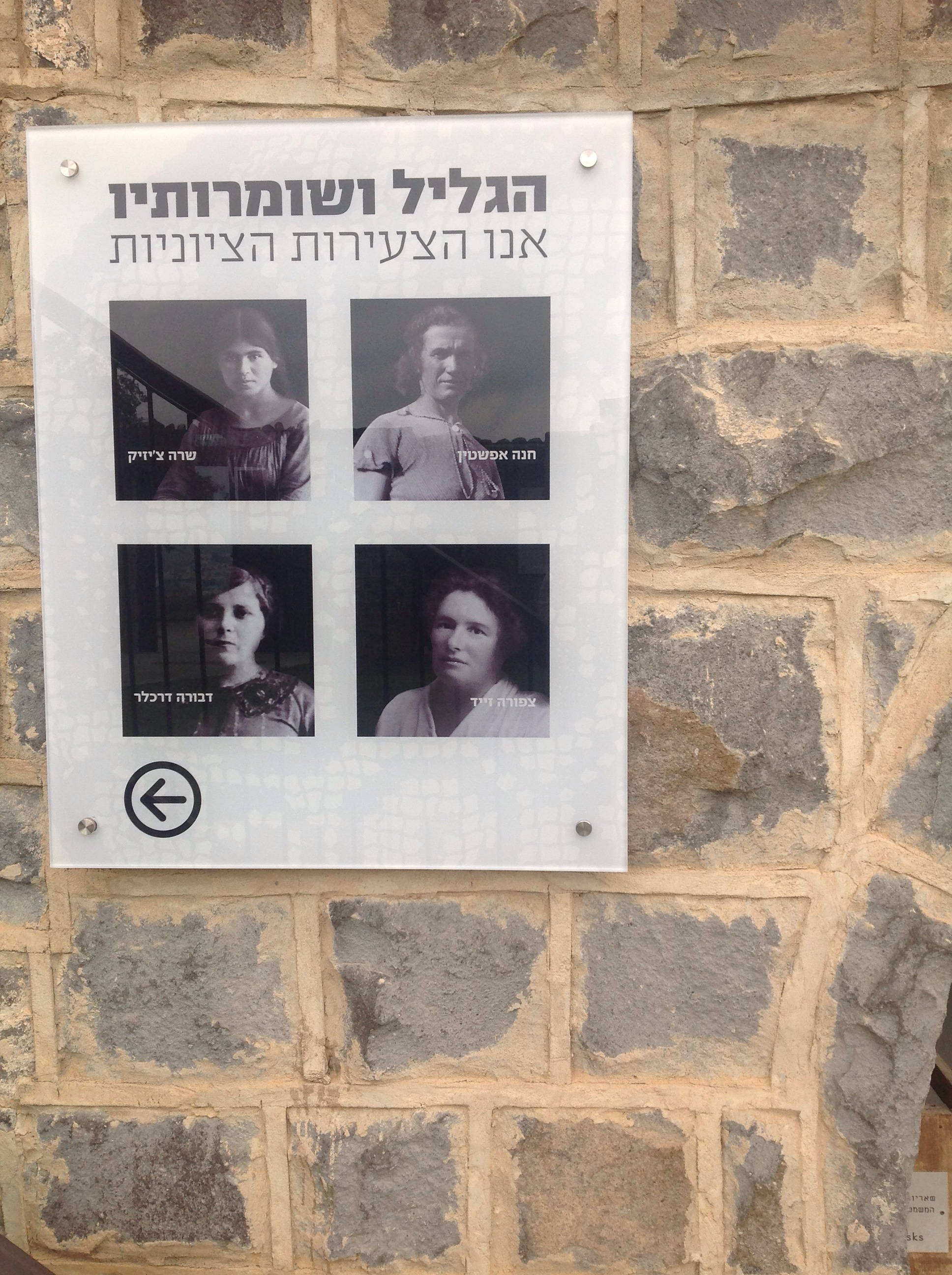 תל חי היה יישוב קטן בגליל העליון בראשית תקופת ההתיישבות הציונית בארץ ישראל. ב-1920 התחולל בו קרב שהפך סמל ללחימת מעטים מול רבים ולערך ההתיישבות.